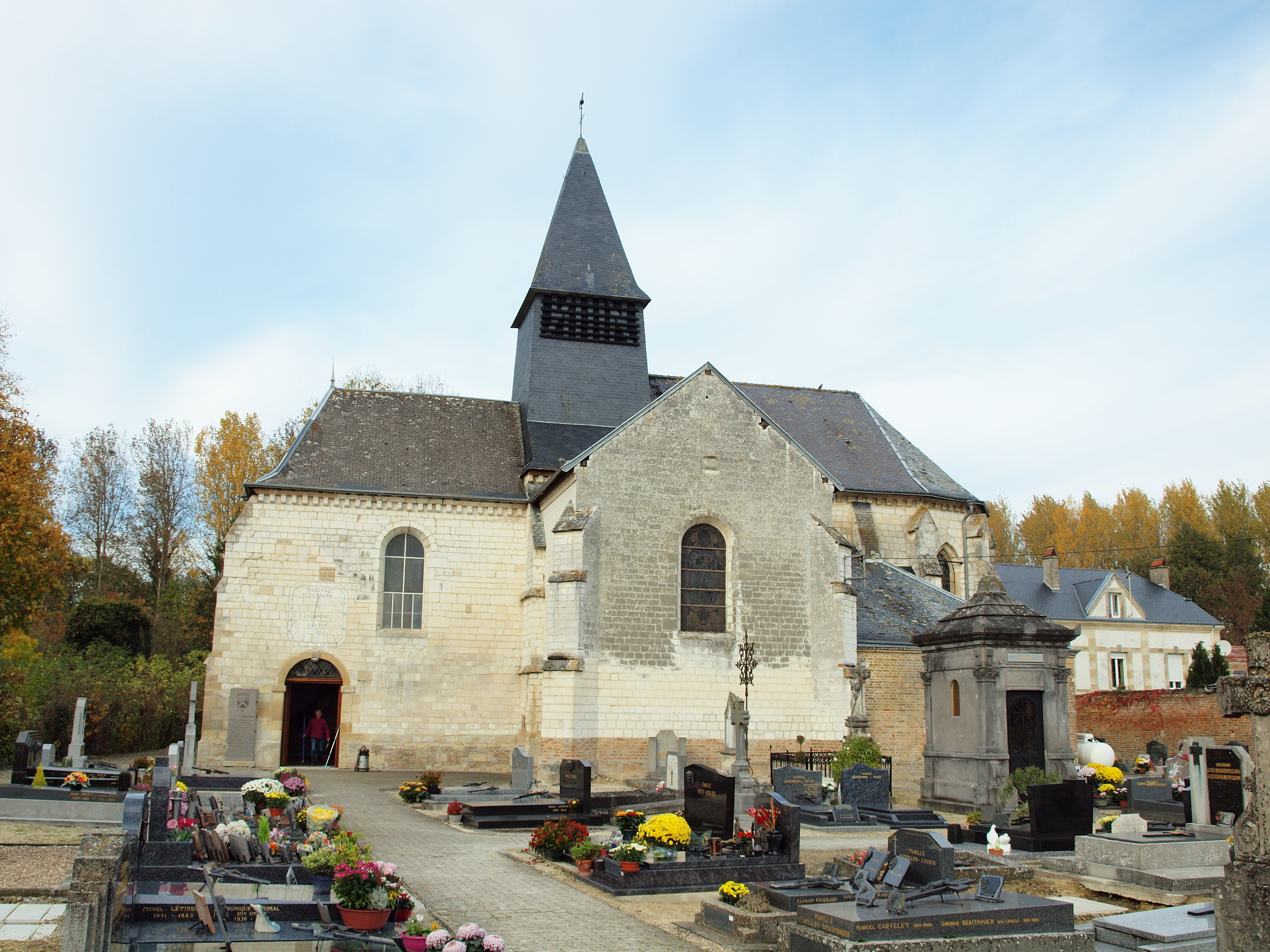 Neuflize (Ardennes, France)